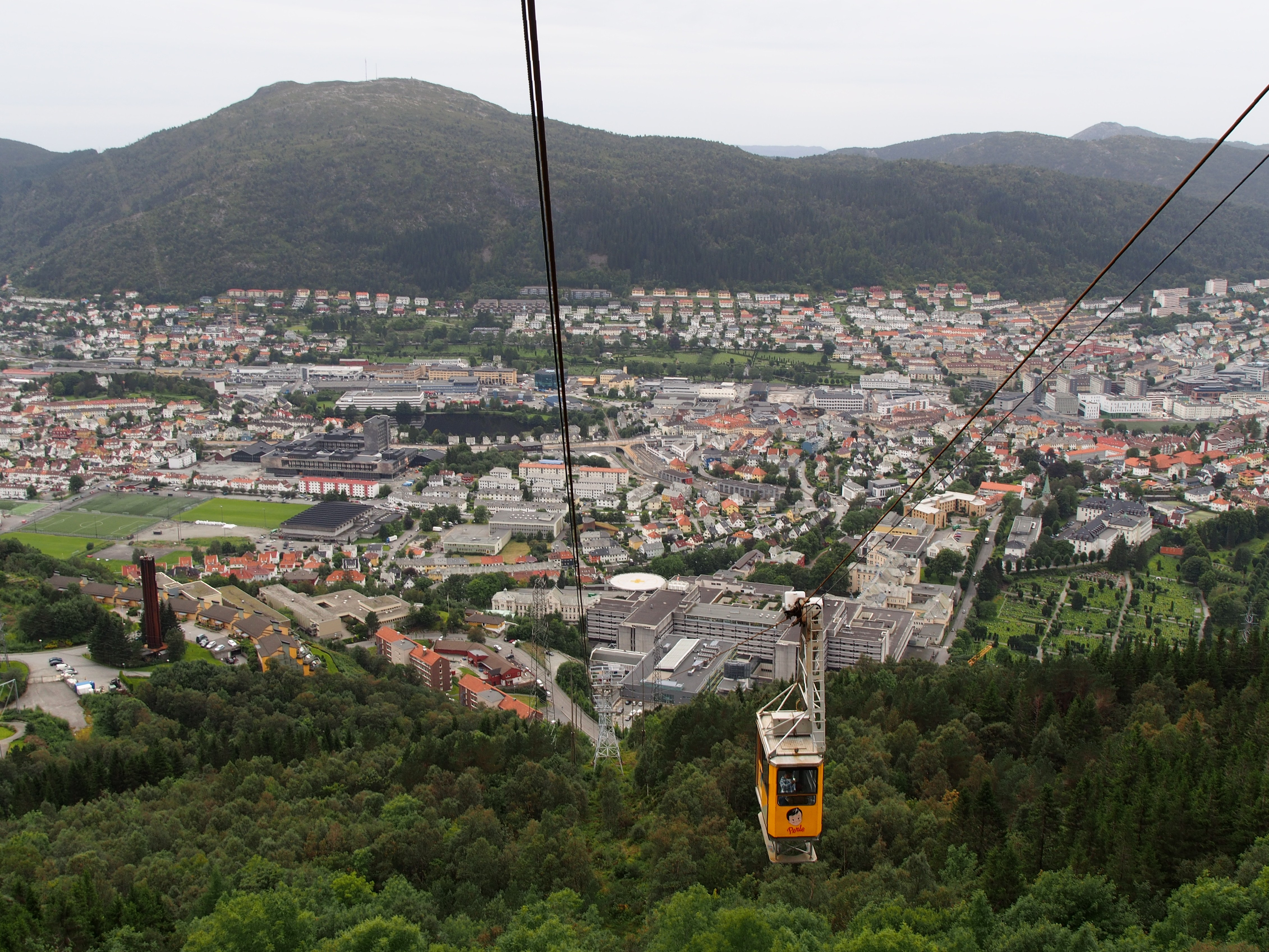 Ulriken Cable Car - 2013.08